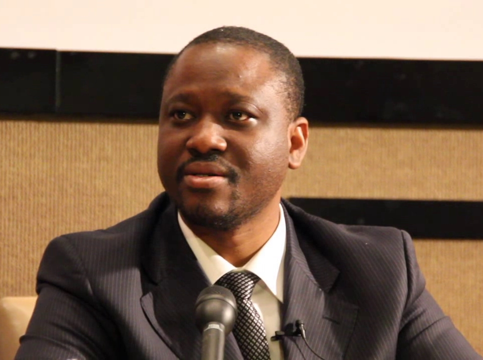 Guillaume Kigbafori Soro, donnant une conférence de presse en Afrique du Sud, en janvier 2011, après le commencement de la crise postélectorale en Côte d'Ivoire.